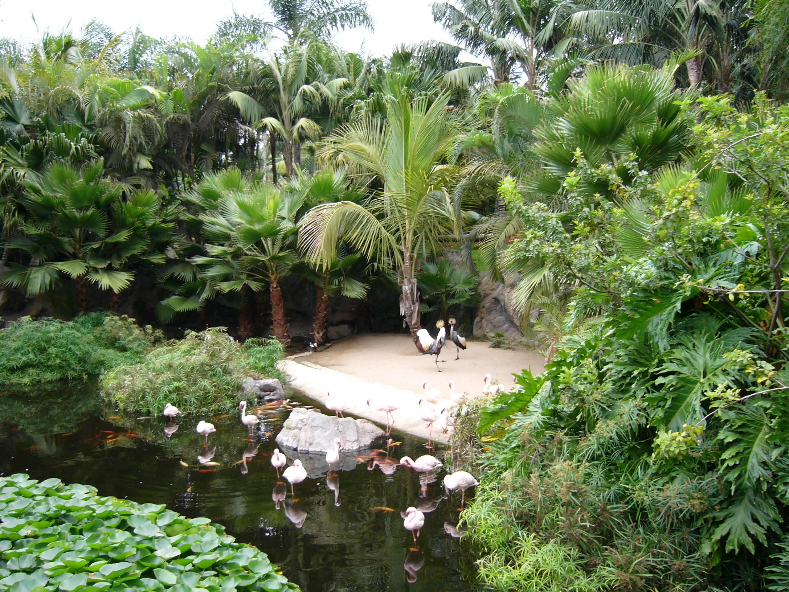 Tenerife: Loro Parque (Puerto de la Cruz) September 2005 Olaf A. Koch own picture